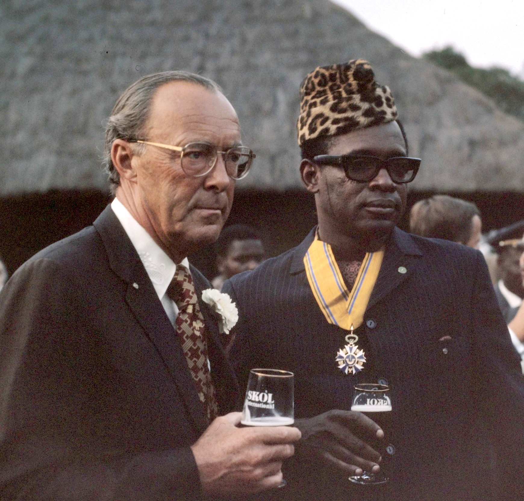 Prins Bernhard in Zaire met President Moboetoe